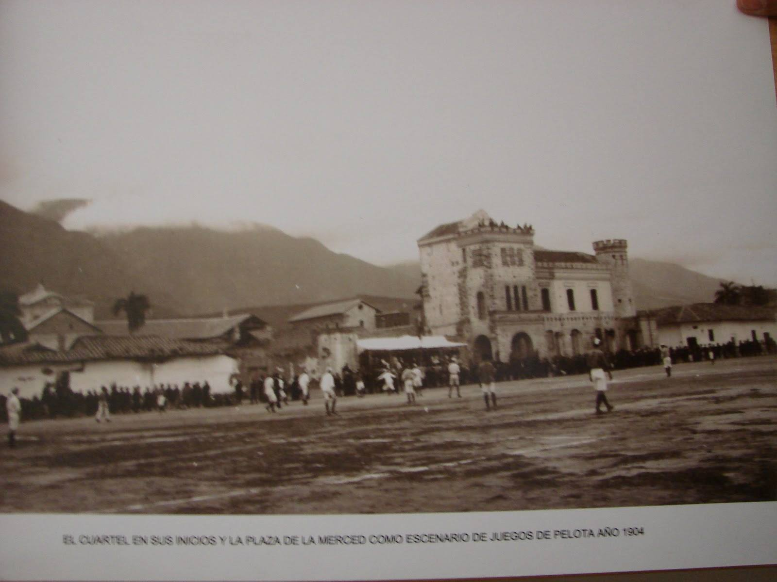 Es una de las edificaciones importantes